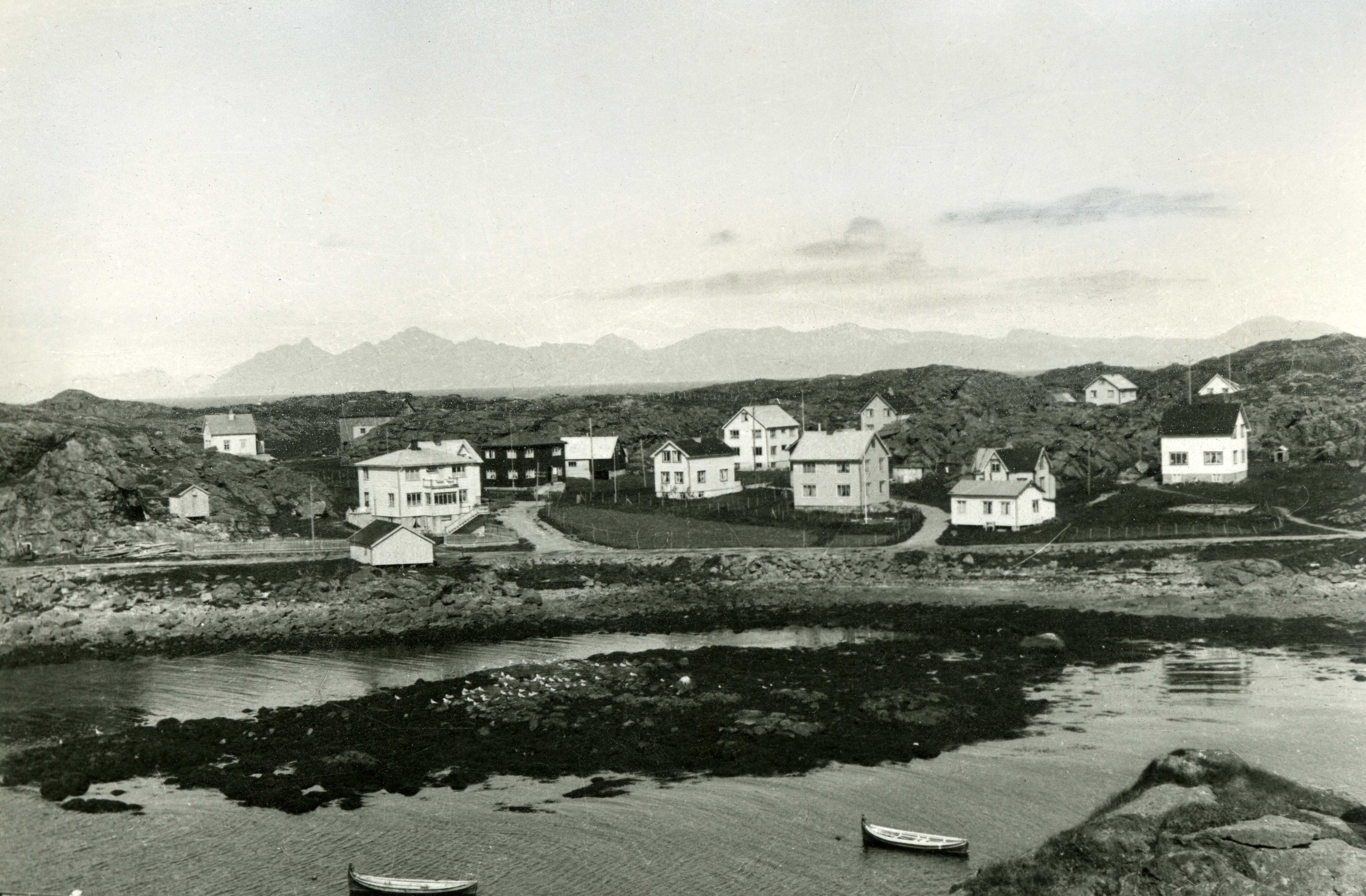 Bildet er hentet fra Nordlandsmuseet bildesamling etter Kanstad. Motivbeskrivelse: Laukvik i Lofoten Sted: Vågan, LOFOTEN, LAUKVIK